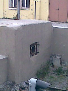 Тупик на Варшавском вокзале, на котором испытывали путевой энергопоглощающий упор (одно из видео с этим испытанием ныне известно как "Краш-тест электрички")